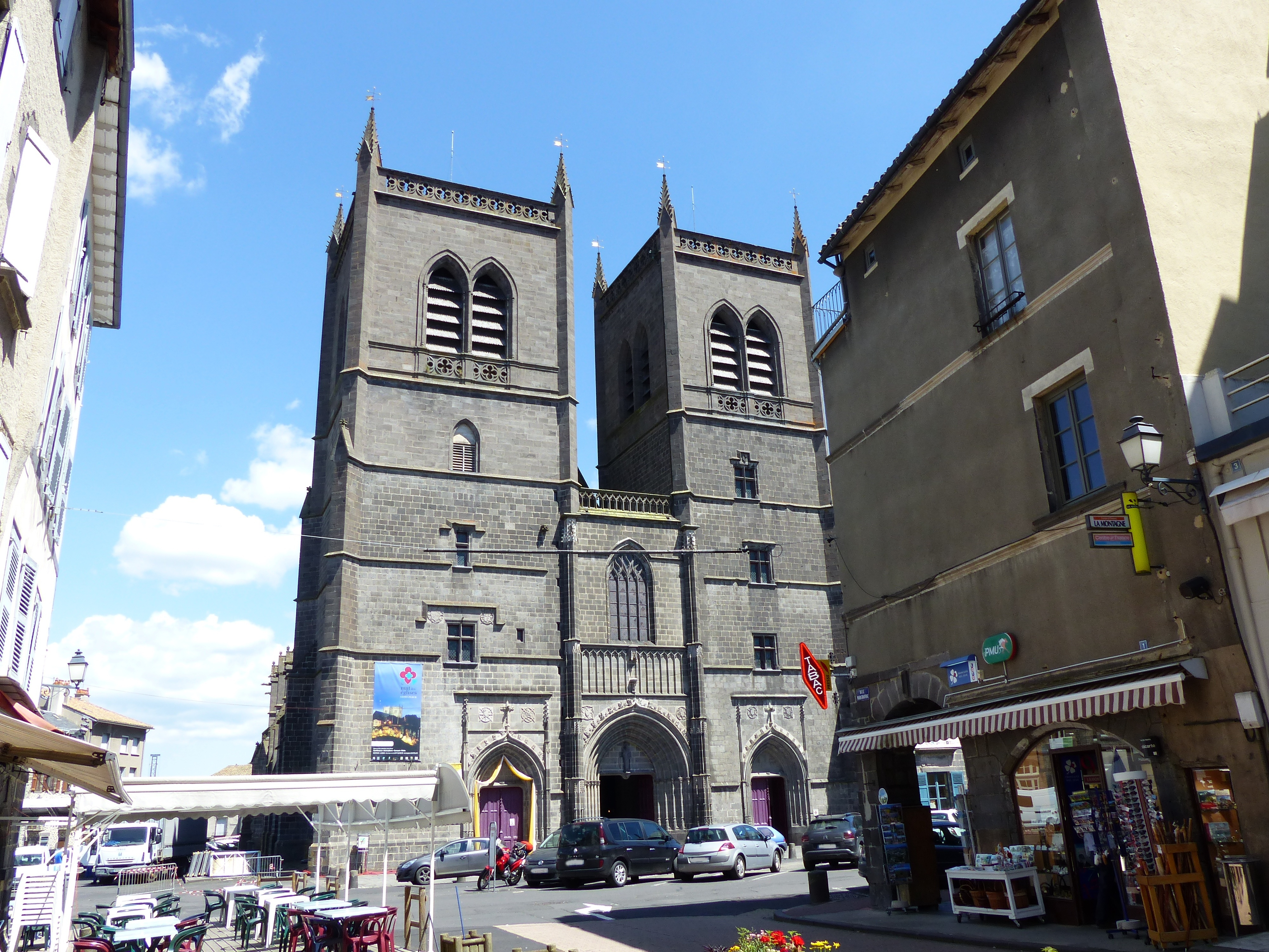 Cathédrale .